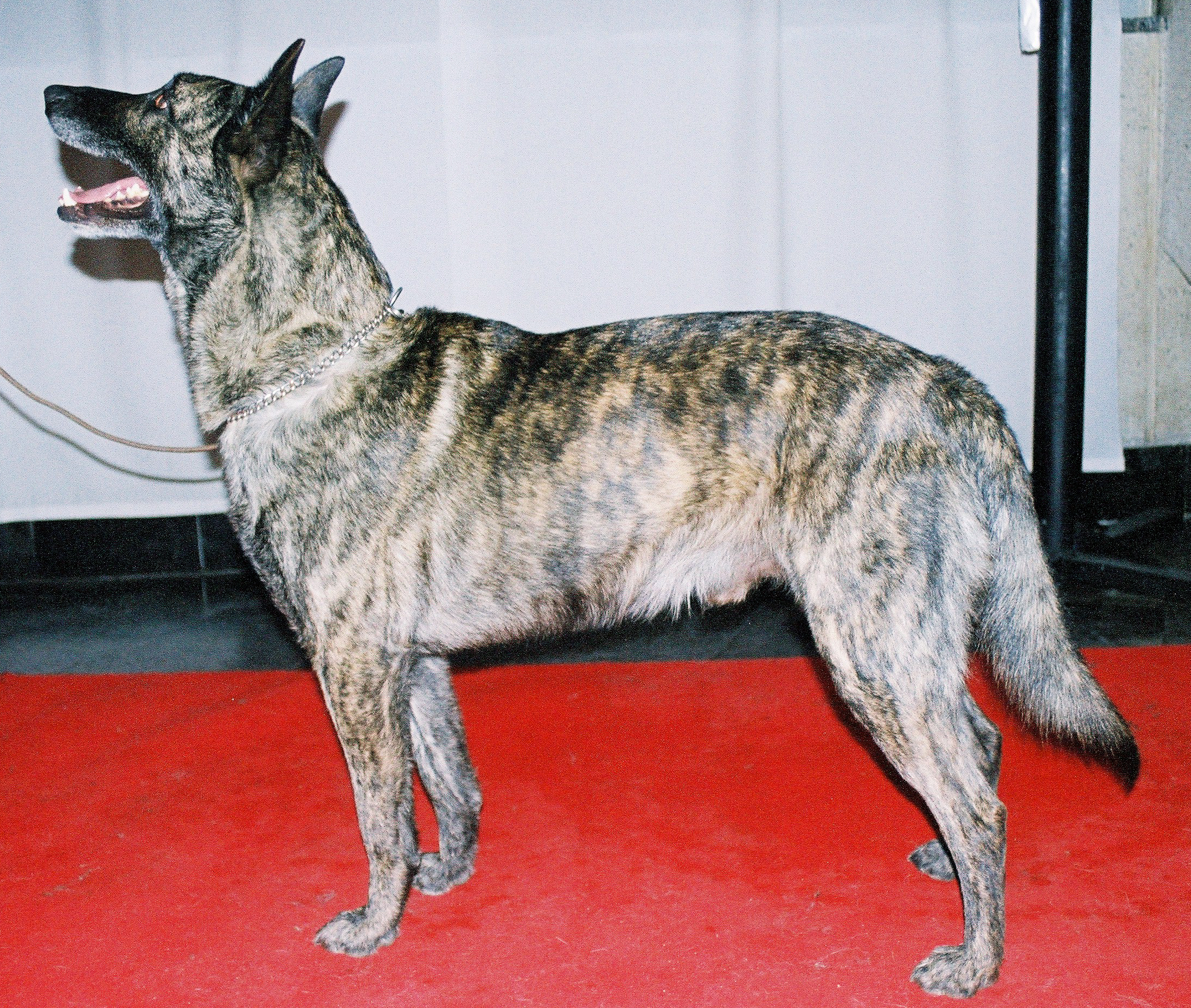 autor: Pleple2000 10:47, 5 April 2006 (UTC)